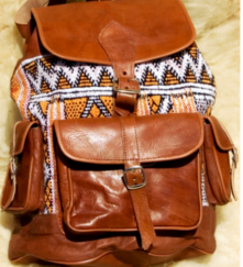 Mochila de cuero Árabe, marroquí artesanal.